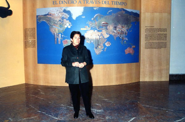 Carmen Alfaro Asins.